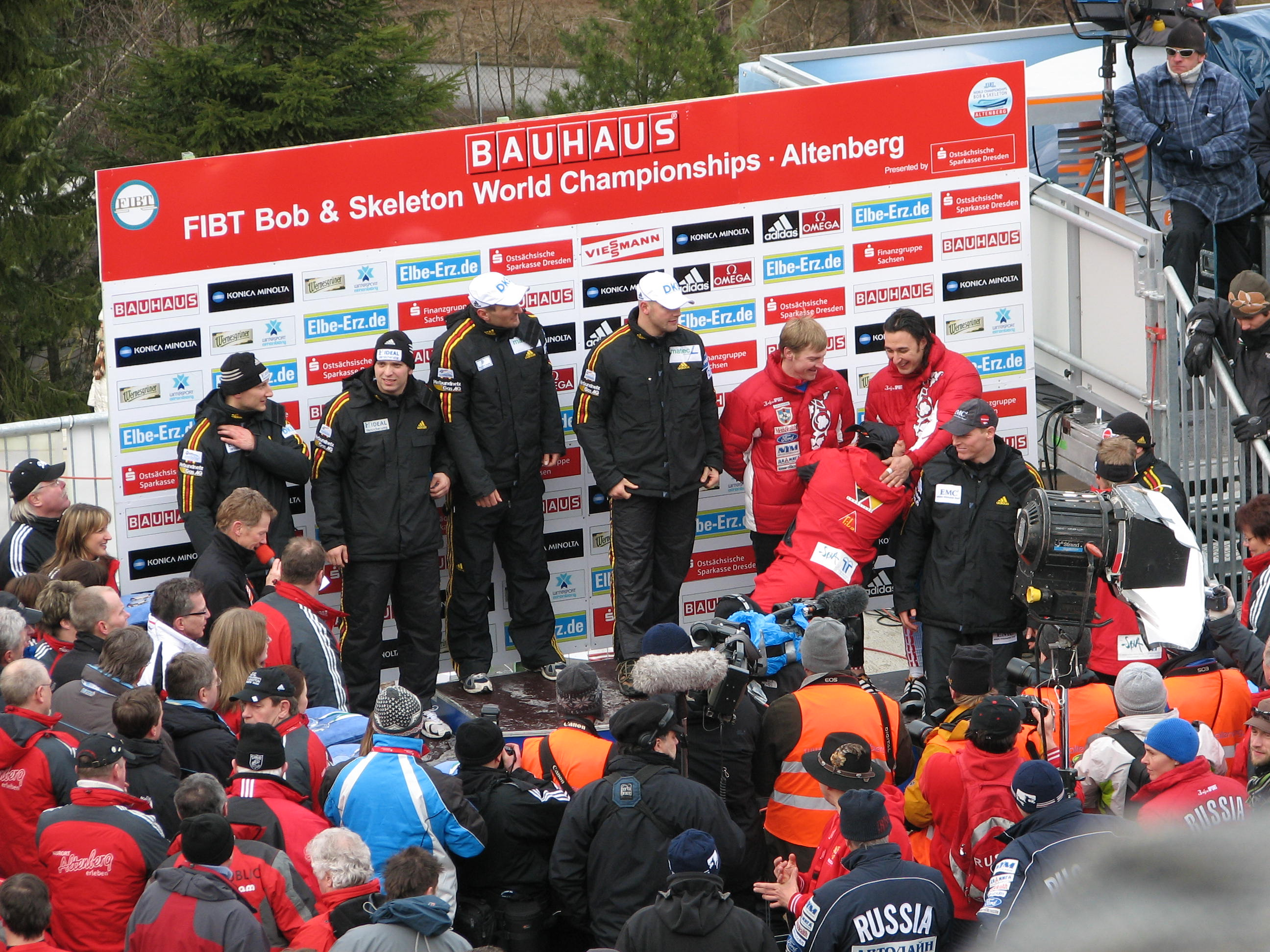 Bob-Weltmeisterschaft in Altenberg 2008, 11. - 24. Februar 2008